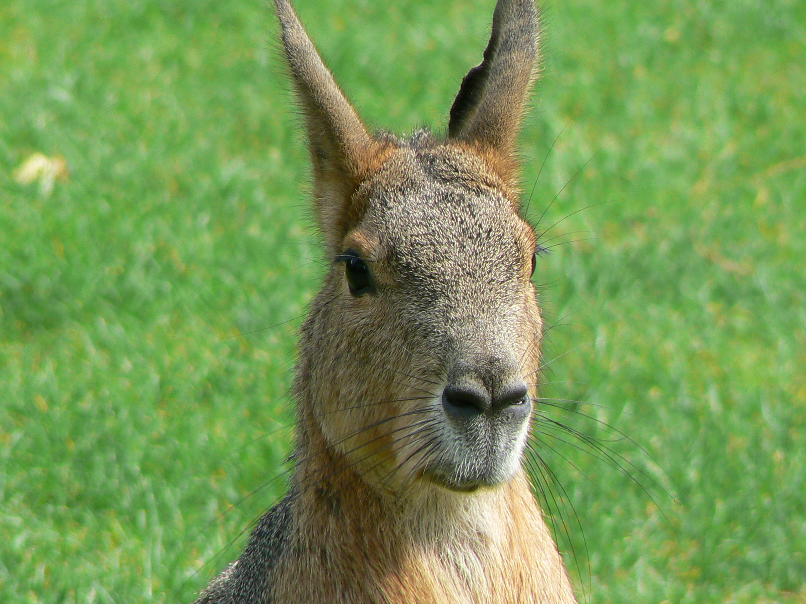 Dolichotis patagonum / Mara / Patagonian cavi / pampashase